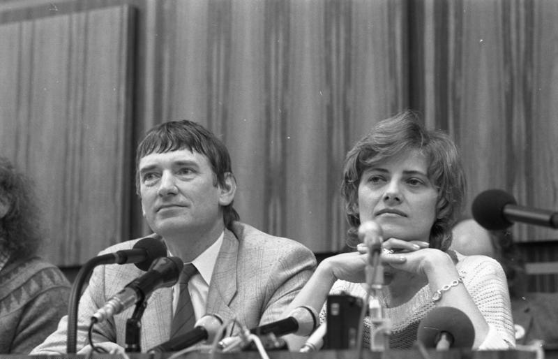 Pressekonferenz der "Grünen" zum Ausgang der Bundestagswahl vom 6.3.1983- im Saal der Bundespressekonferenz.